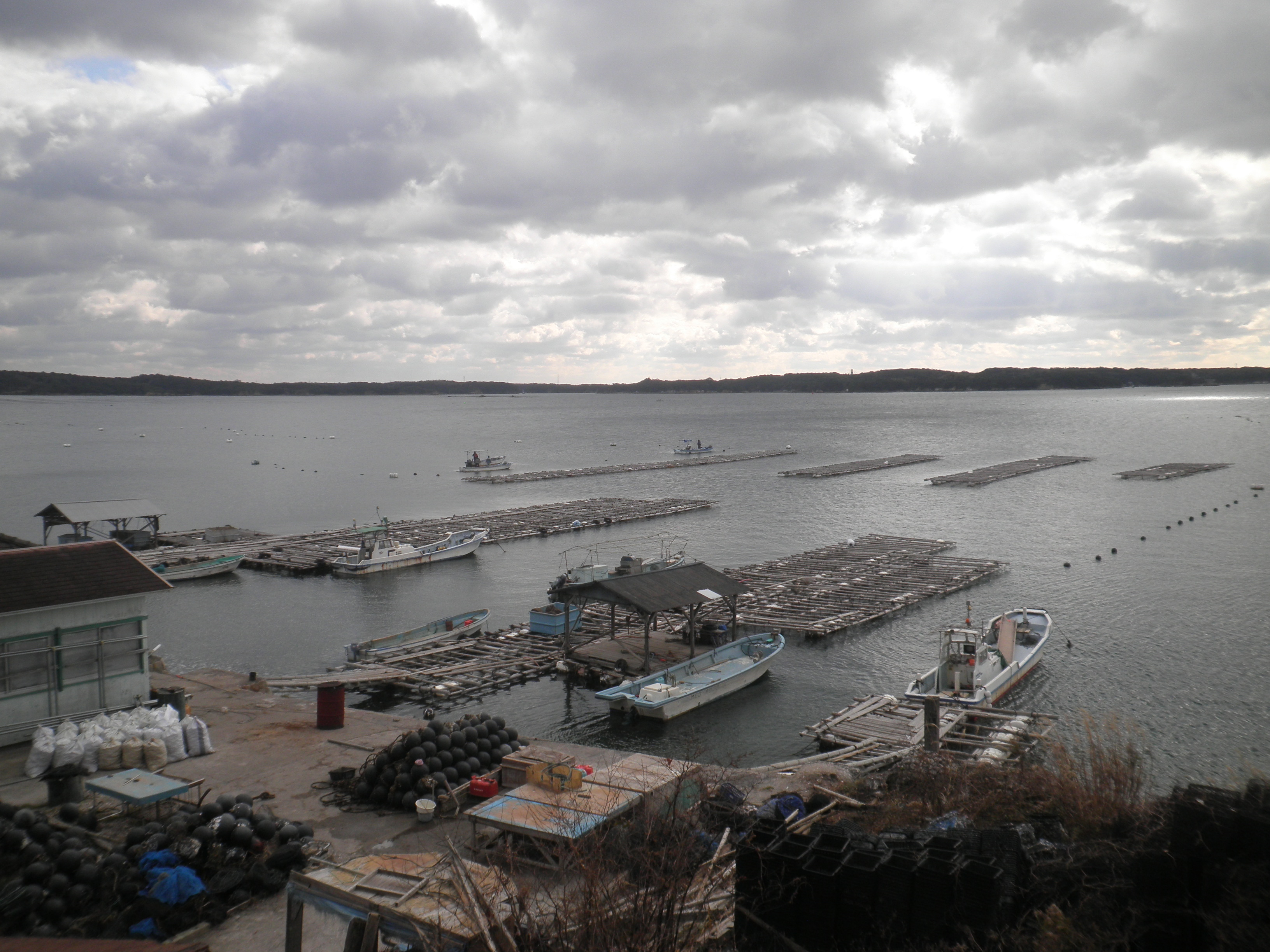 三重県志摩市の間崎島